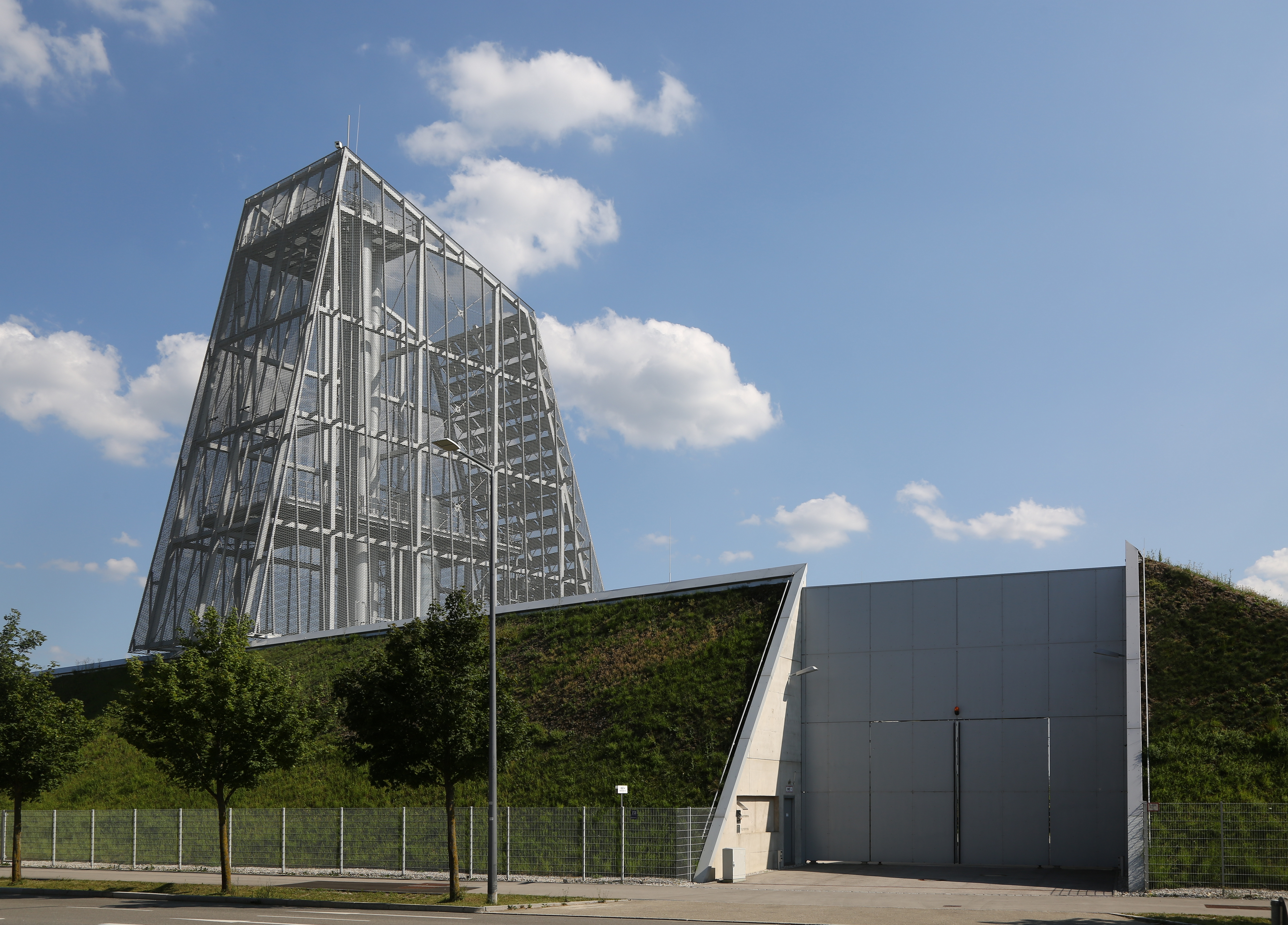 Geothermie-Kraftwerk München-Freiham